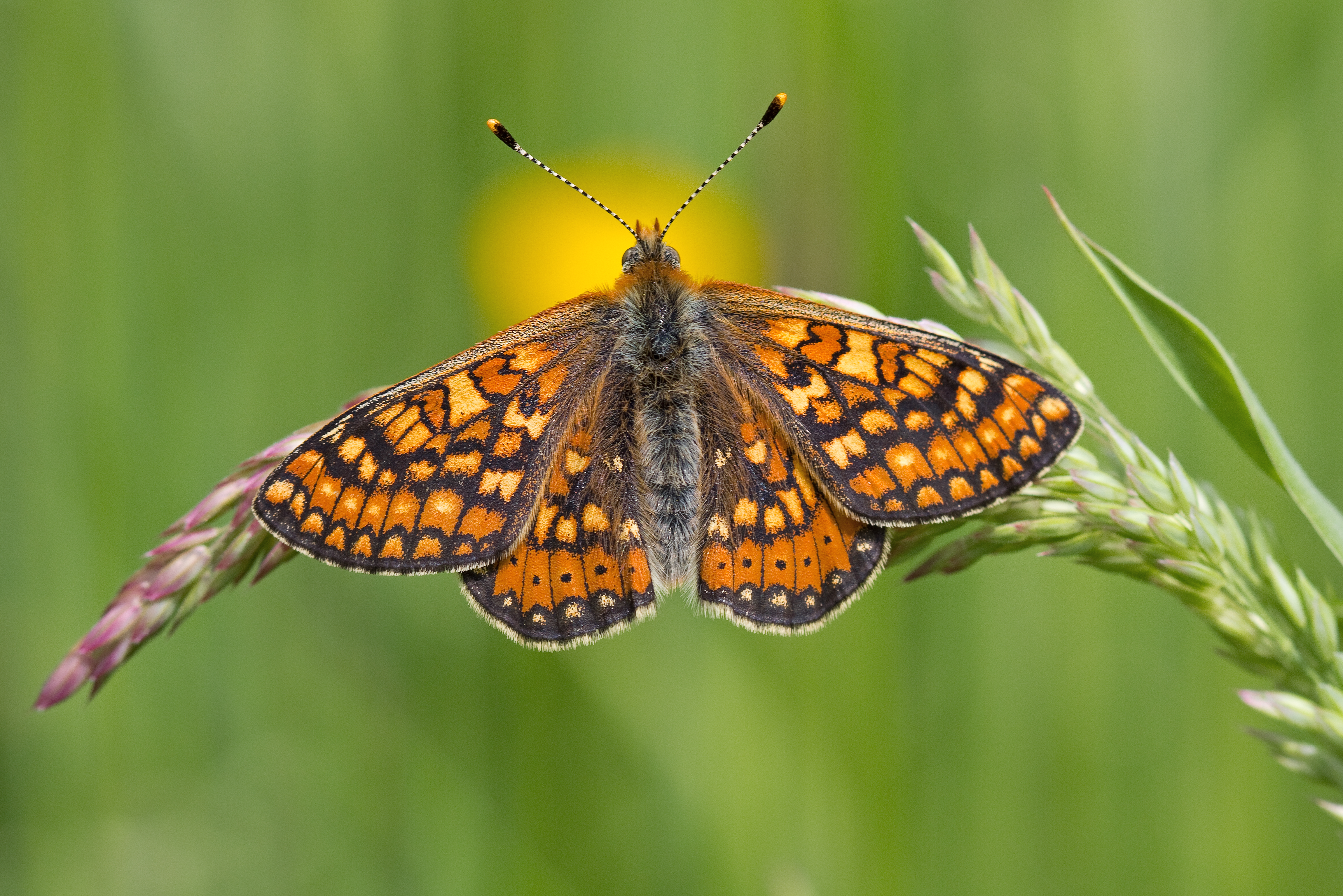 Damier de la succise (Euphydryas aurinia) posé sur un épi de graminée dans une prairie humide. Corrèze, Limousin, France.